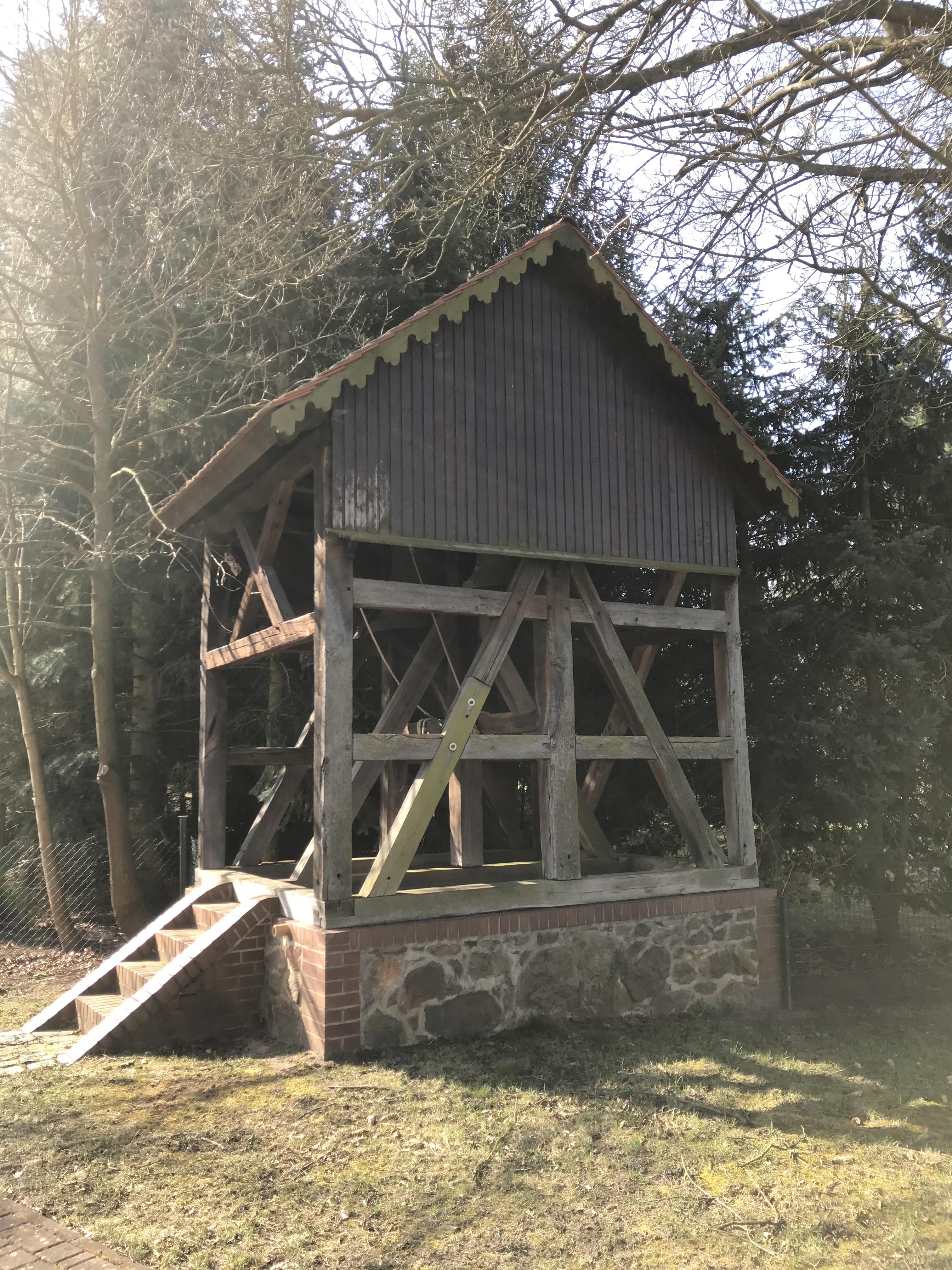 Die Dorfkirche Bornsdorf ist eine spätgotische Saalkirche aus dem 15. Jahrhundert in Bornsdorf, einem Ortsteil der Gemeinde Heideblick im Landkreis Dahme-Spreewald in Brandenburg.